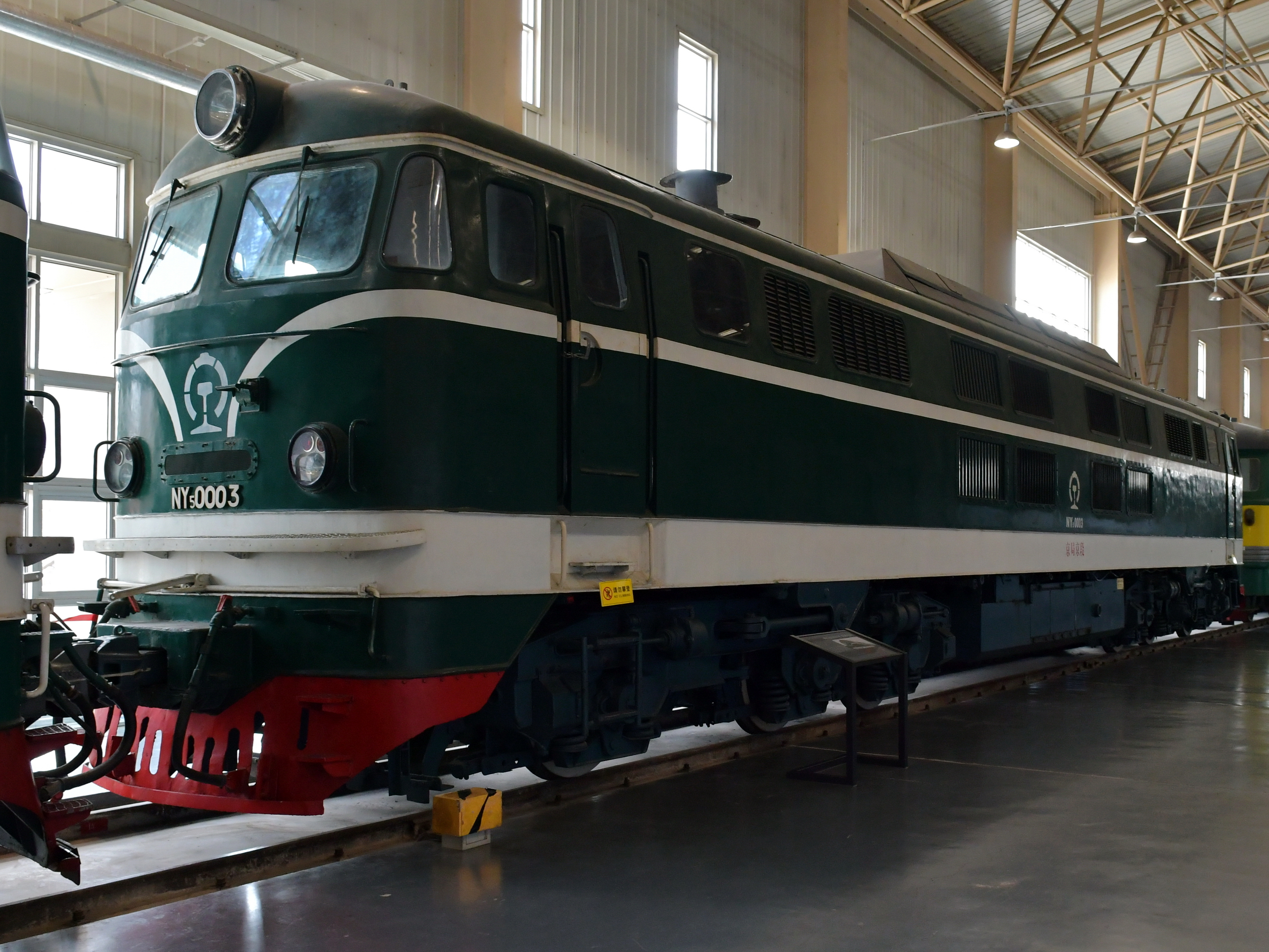 NY5型0003号机车，保存在中国铁道博物馆